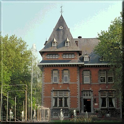 Town hall of Zwevegem, West-Flanders, Belgium